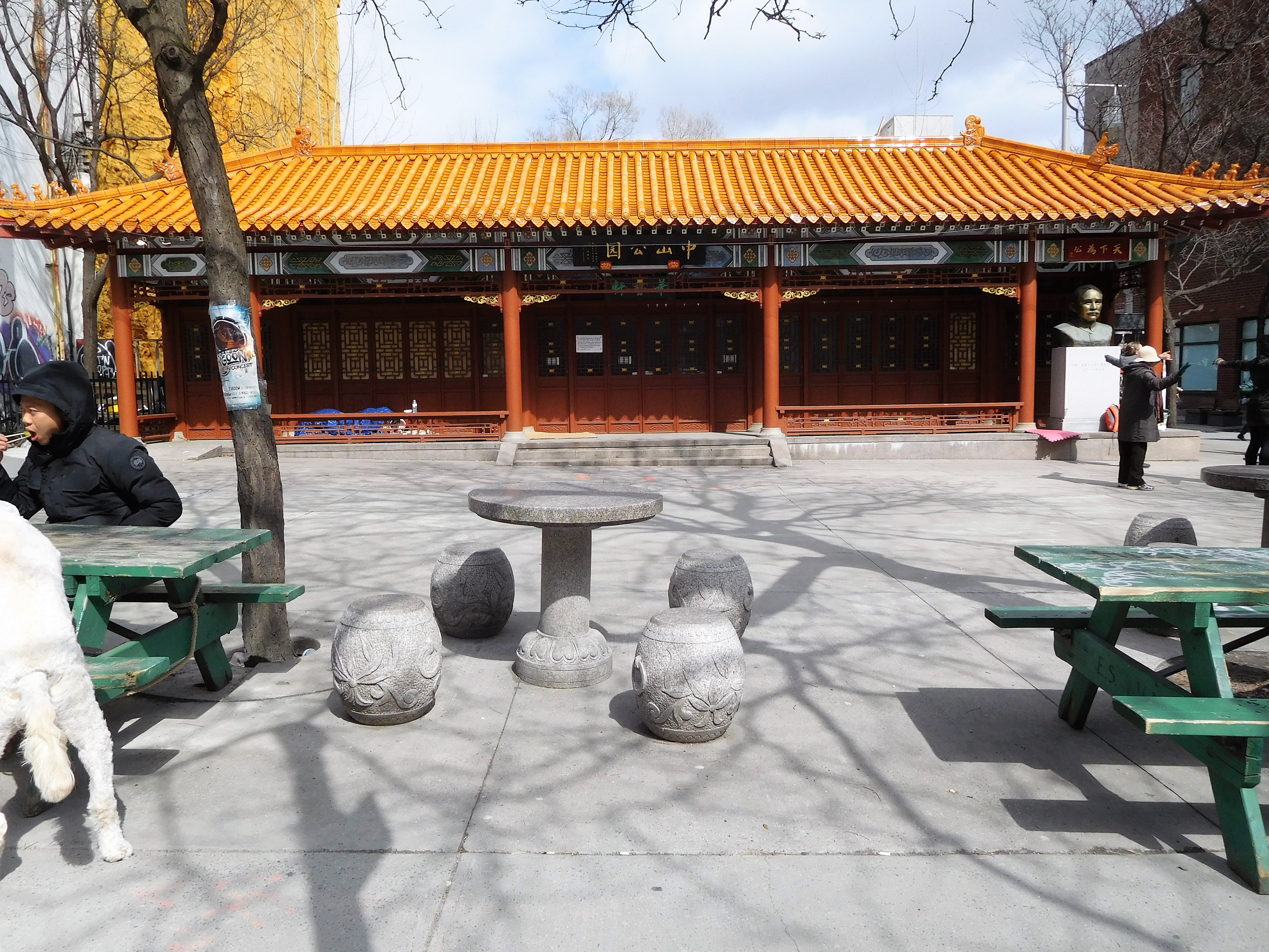 Place Sun Yat-Sen, à l'intersection des rues De La Gauchetière et Clark, quartier chinois de Montréal